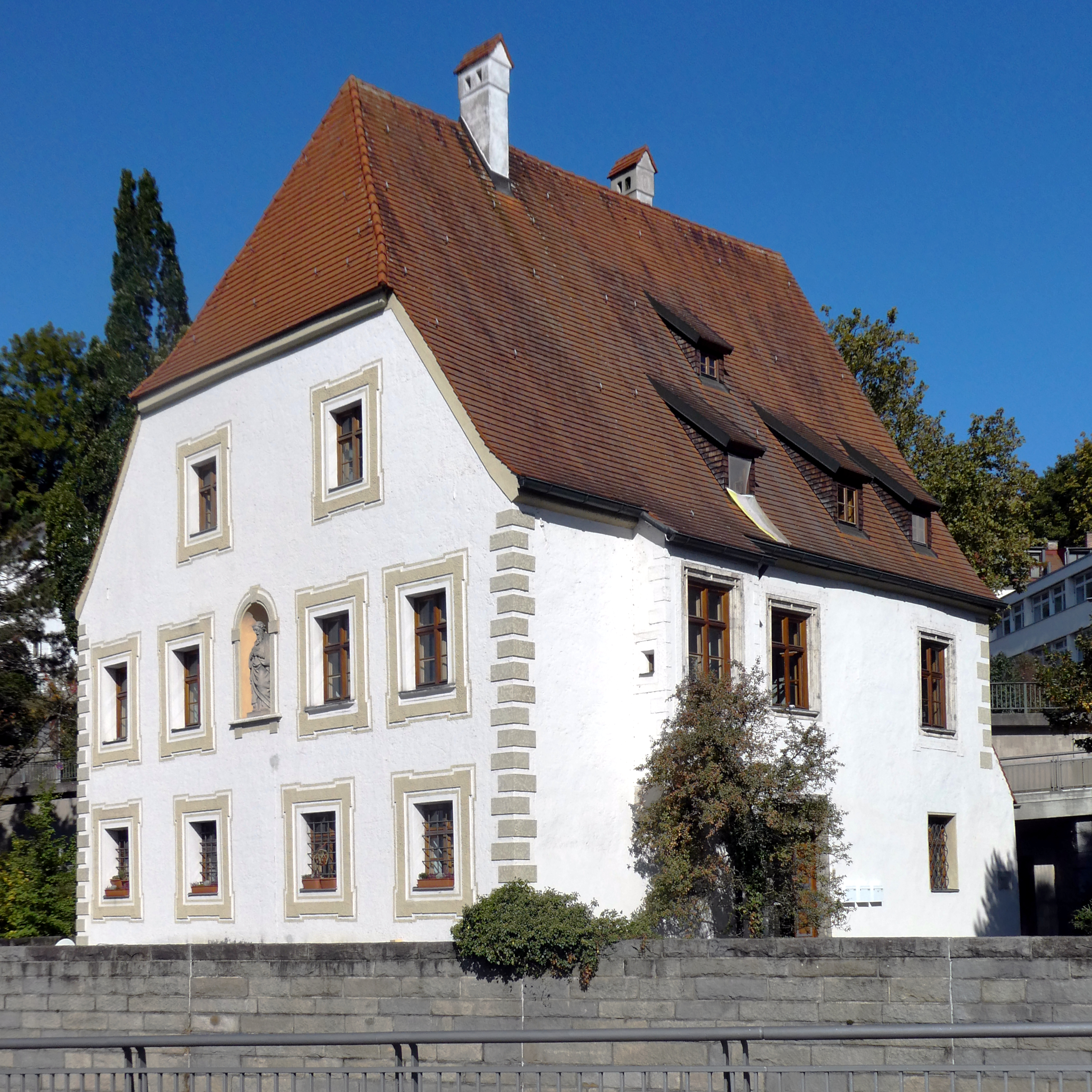 Passau, ehemaliges fürstbischöfliches Schloss Eggendobl von Südsüdwesten.